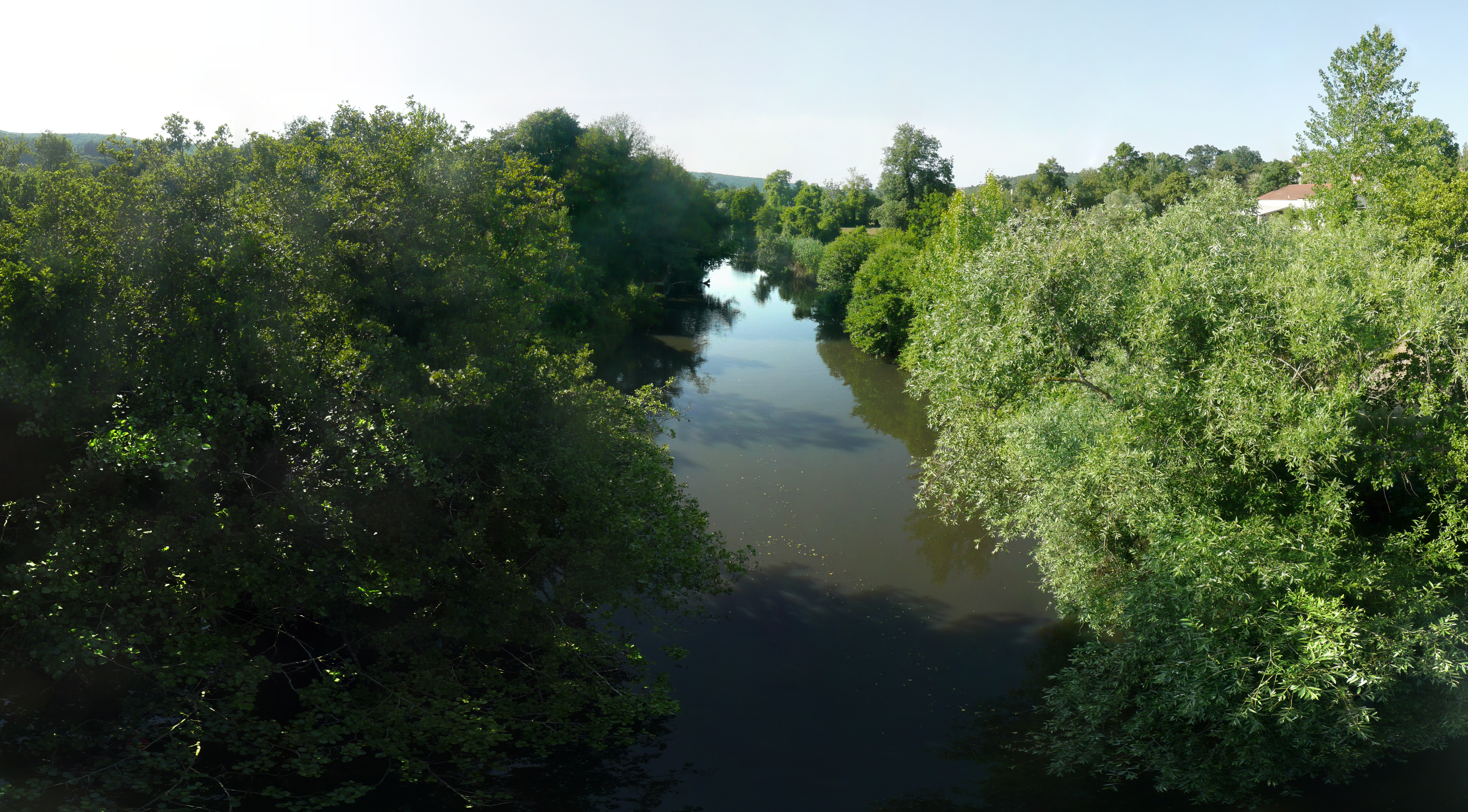 Riva deresi - OpenStreetMap(Info)